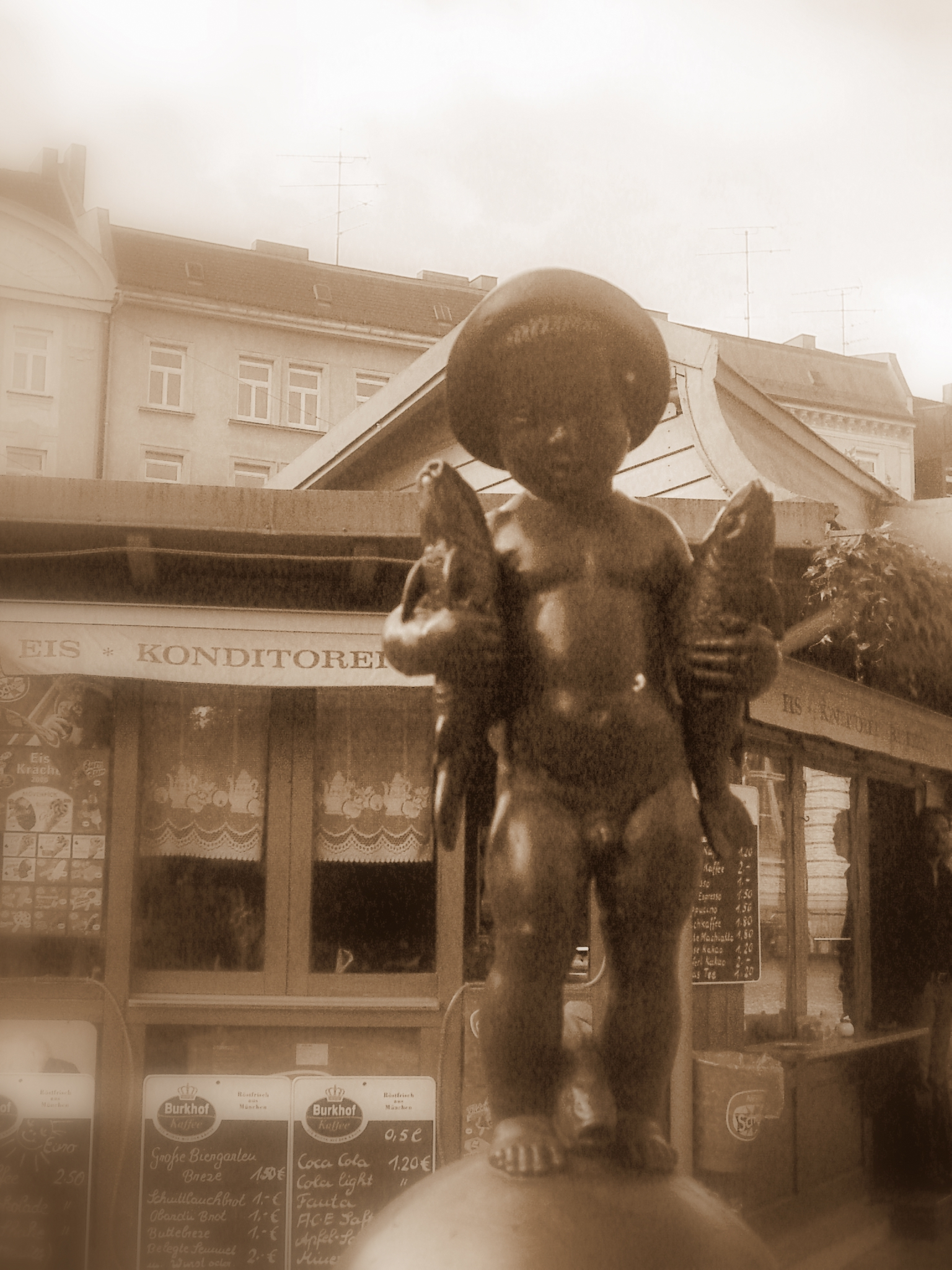 Brunnenbüberl am Wiener Platz in München